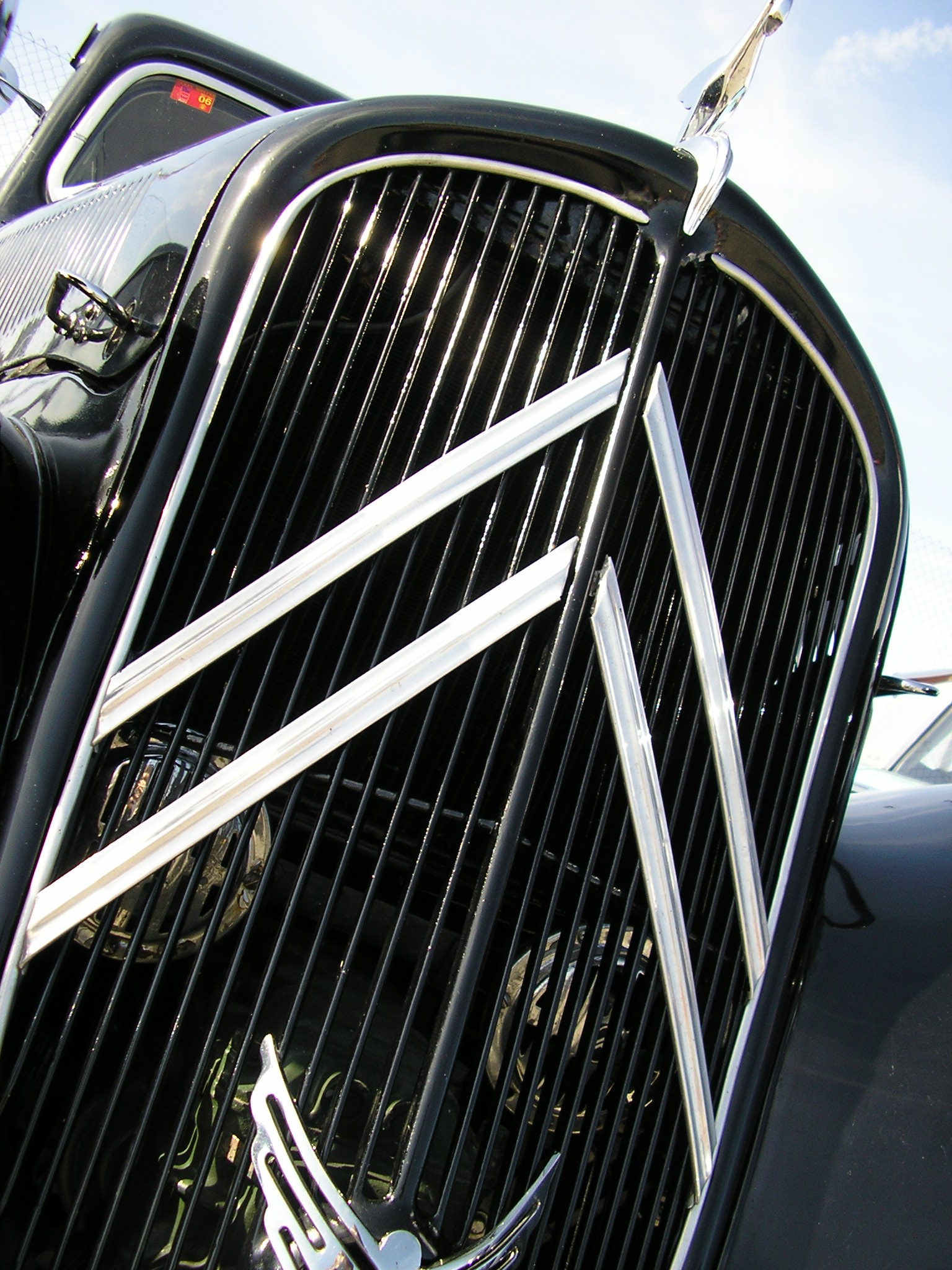 Citroën Traction Avant shown in Circuito del Jarama (Madrid). Jornada de puertas abiertas 2006.